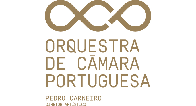 Logo OCP